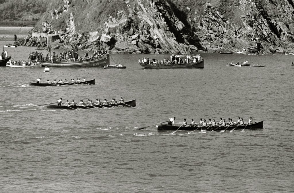 Título original: Regatas de traineras en la bahía de la Concha (109/127) Localización: San Sebastián (Guipúzcoa)